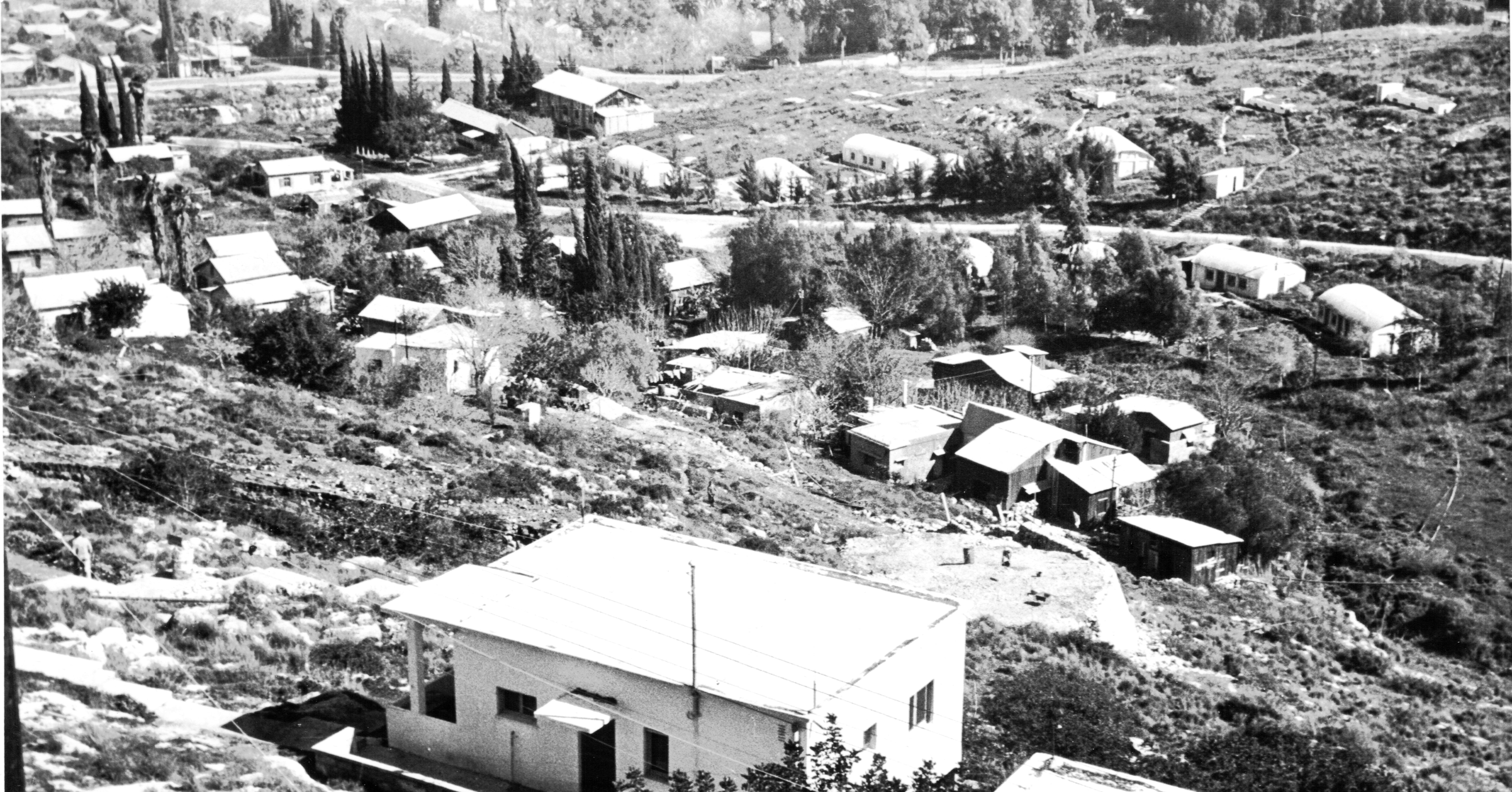 מבט מגבעת נשר לעבר שכונת נשר, ברקע גבעת העמדות, הבונקרים של מתחם הנ"מ הבריטי ממלחמת העולם השנייה וצריף הפועל